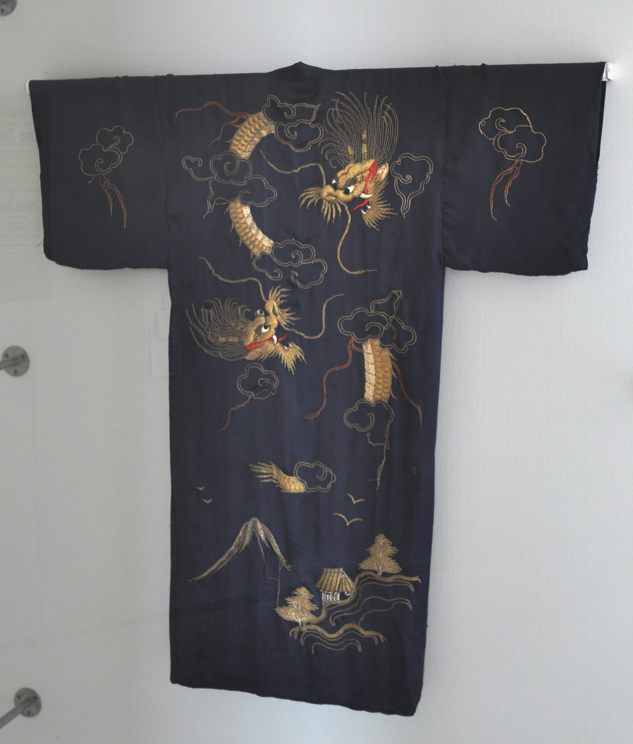 Chinesischer Hausmantel, unbekannter Hersteller, 1930er Jahre; aus dem Nachlass der Varietétänzerin Therese Zauser (1904–1942) Bregenz, Vorarlberg Museum, Sammlung R. Häfele vorarlberg museum Native namevorarlberg museumLocationBregenz, Vorarlberg, AustriaCoordinates47° 30′ 16″ N, 9° 44′ 48″ E Established1857WebsiteVorarlberg Museum website